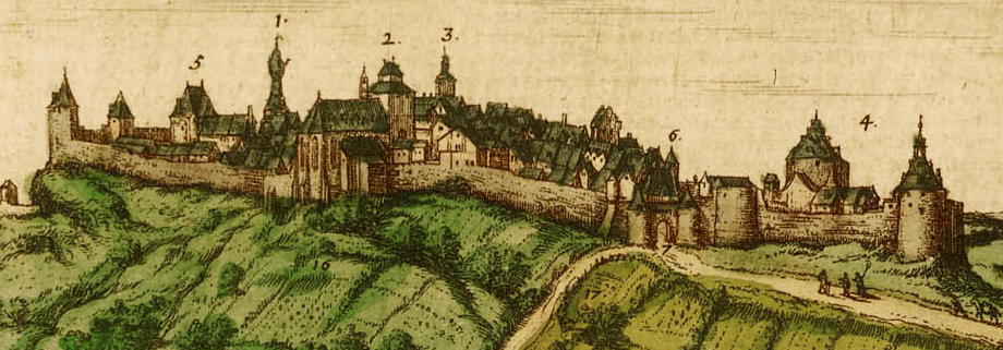 Beeld van de stad Limburg, hoofdstad van het hertogdom Limburg; omstreeks 1600 1. La tour Jehan le Westi. 2. S. George Eglisse parochial. 3. La haille mason de la Ville. 4. Le Chateau. 5. La porte de haul. 6. La port de Chateau.